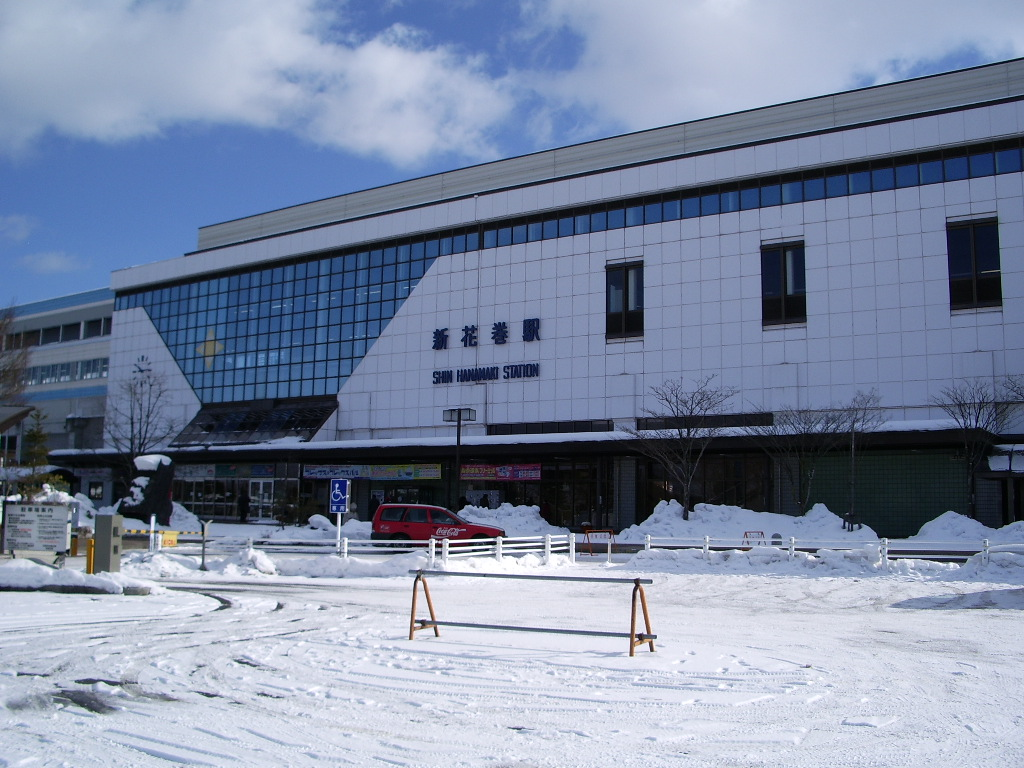 Shin-hanamaki-sta